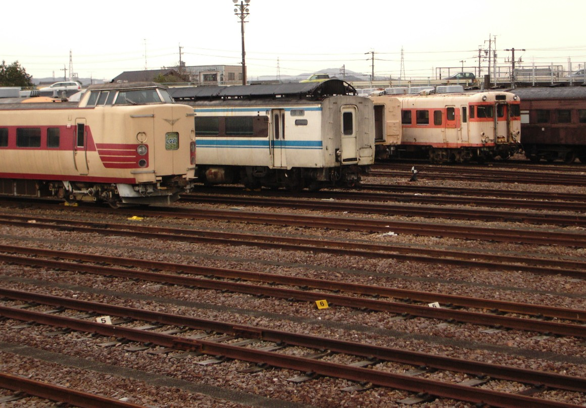 JR東海 美濃太田車両区（一部）